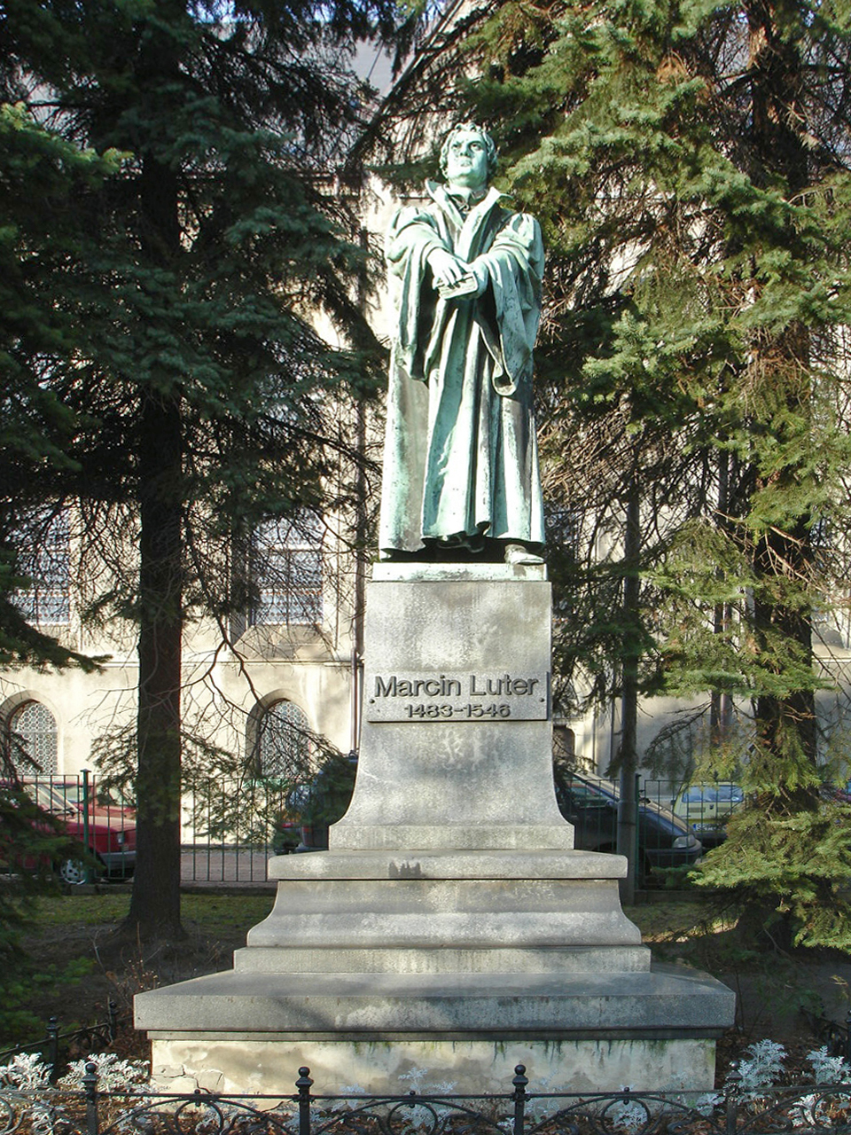 pomnik Marcina Lutra w Bielsku-Białej (Sculptor: Franz Vogl).